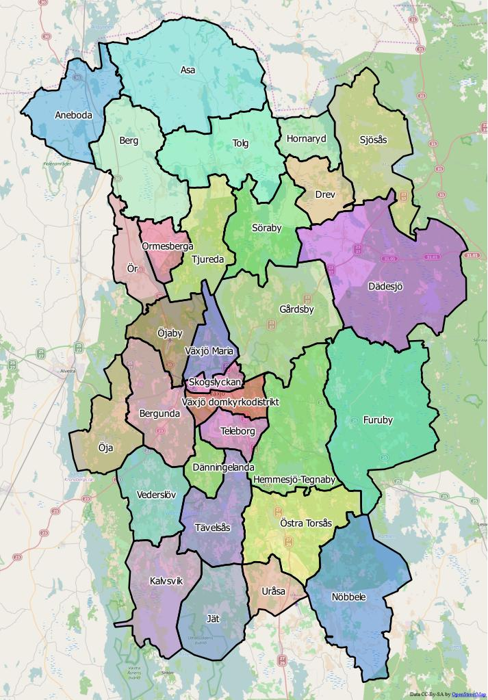 Distriktsindelningen i Växjö kommun World file 130.01997021116309838 0 0 -130.01997021116309838 1607345.05607513315044343 7810045.50083525571972132